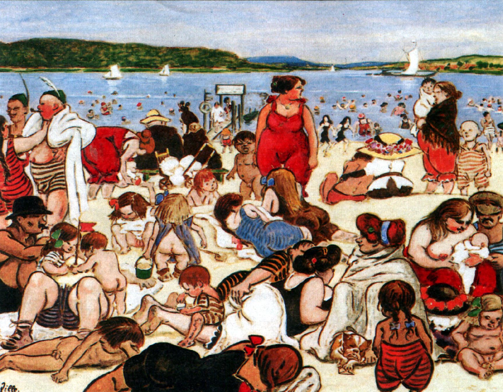 Berliner Strandleben, 1901, Aquarell von Heinrich Zille (1858-1929), Privatbesitz, Berlin